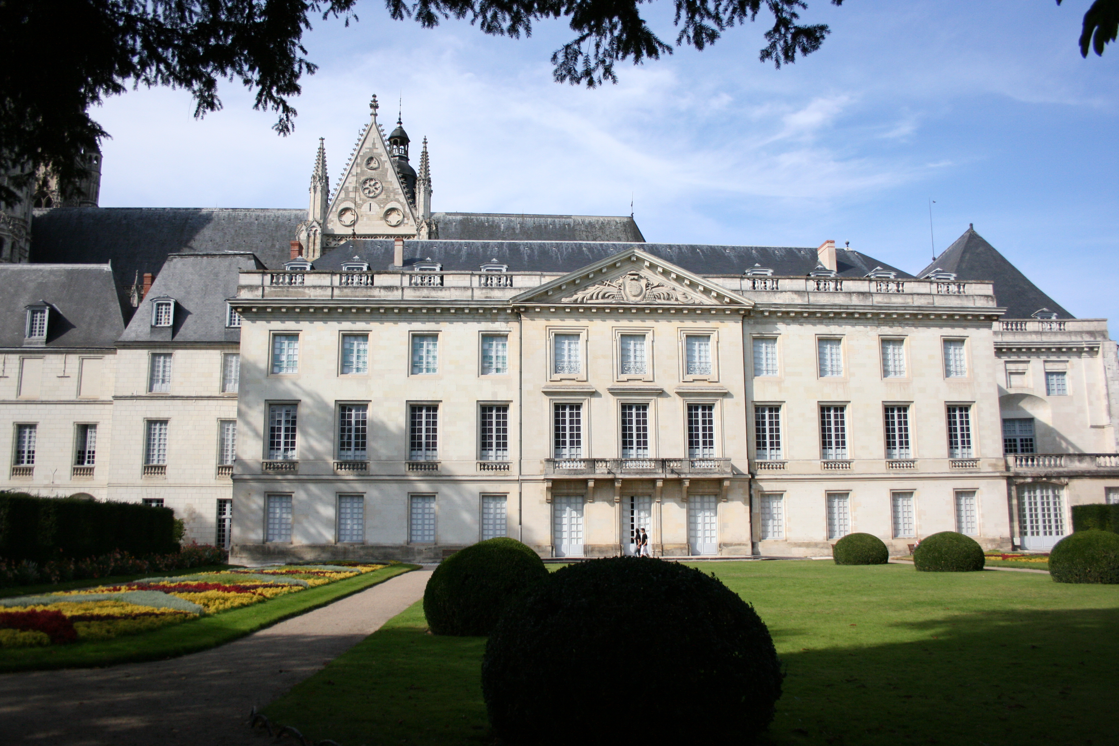 Musée des Beaux-Arts de Tours, ancien palais des archevêque, ailes du XVIIe et XVIIIe et complétement à droite grande salle des états généraux XIIe siècle